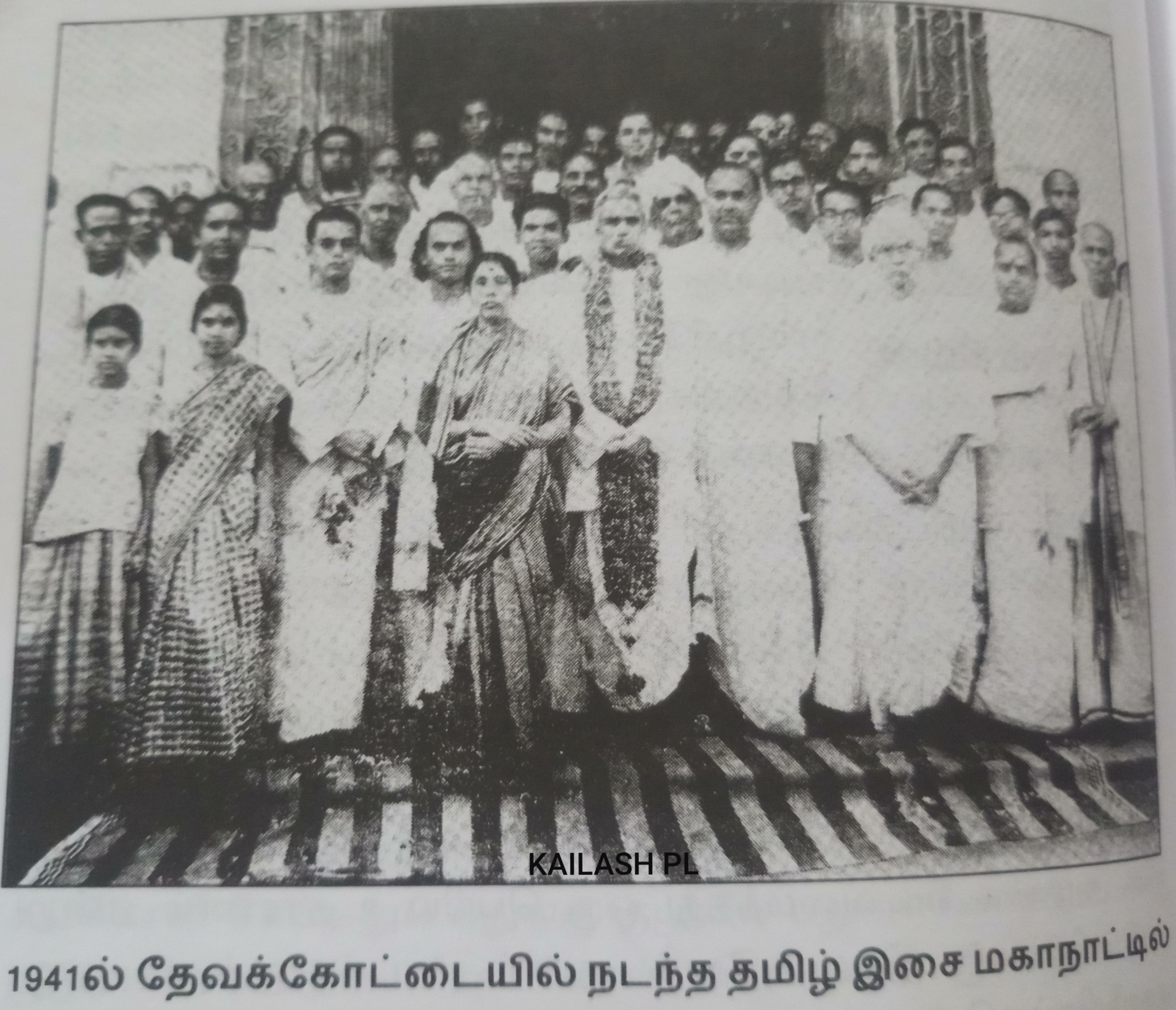 1941ஆம் ஆண்டு தேவகோட்டையில் நடந்த தமிழிசை மாநாடு புகைப்படம்.